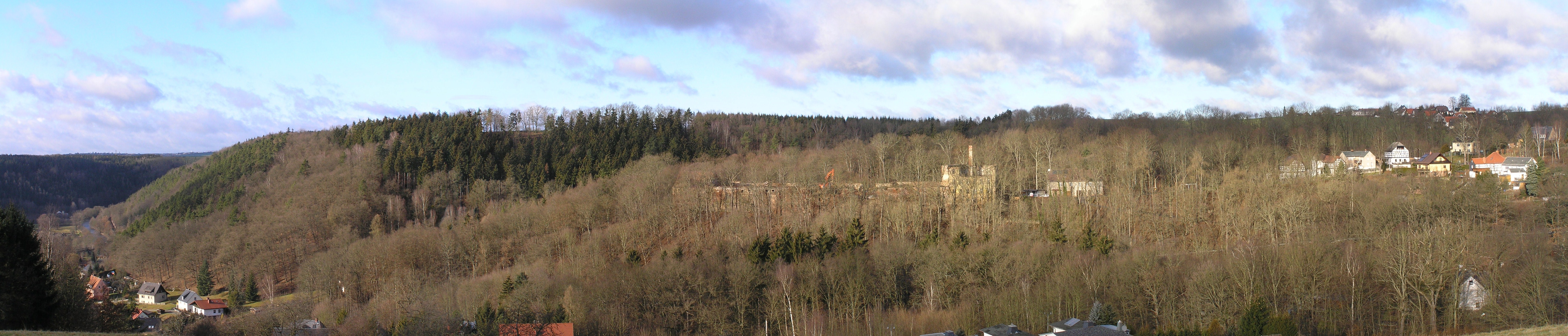 Schloss Berga am 06.01.2012 im Rückbau